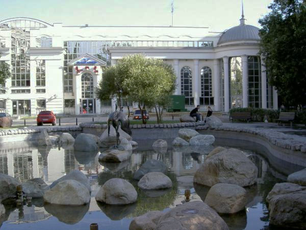 Многофункциональный комплекс «Белый лебедь» Москва / Чистопрудный бул.